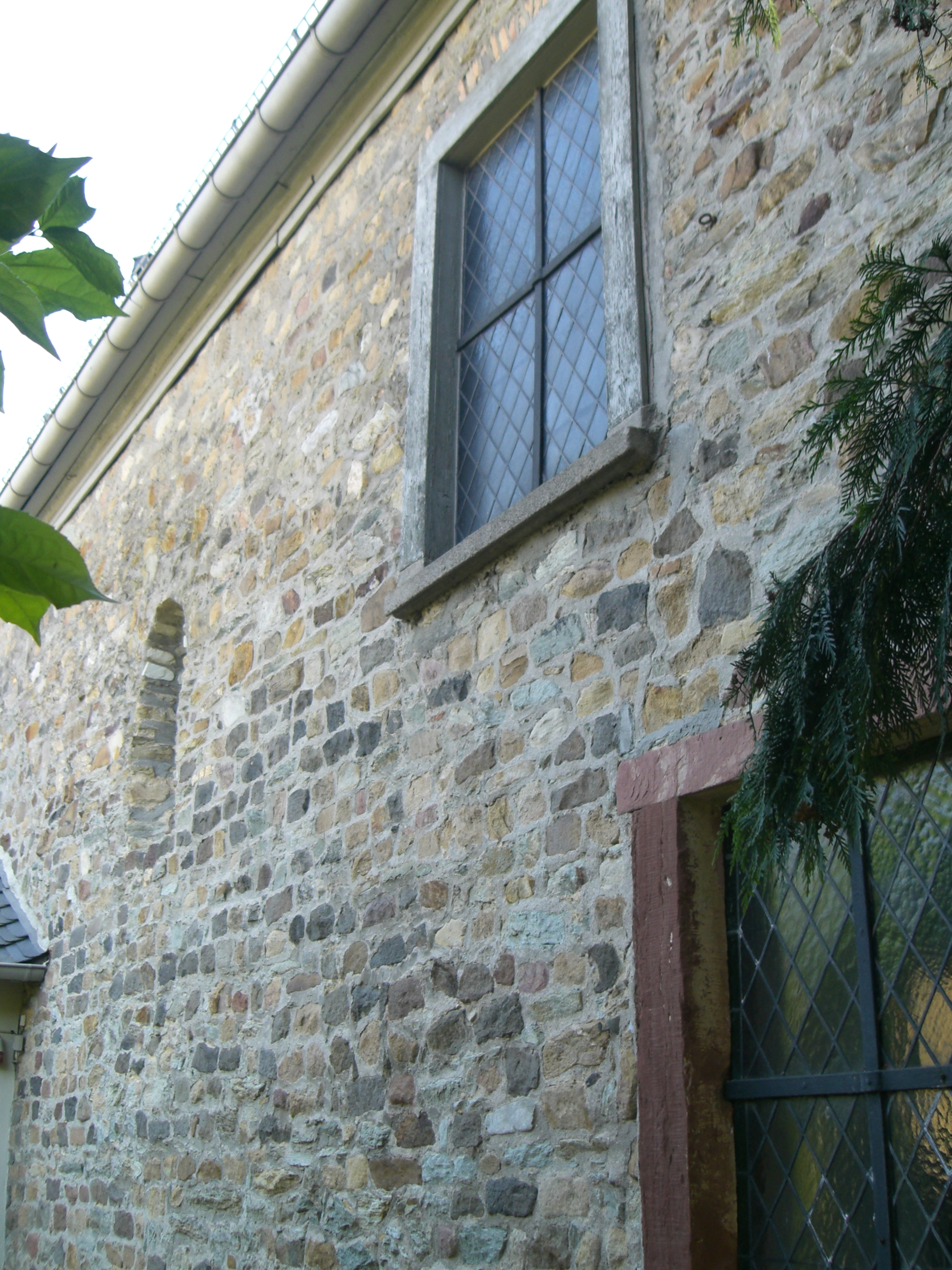 St. Georgskirche Steinbach Taunus Nordseite mit romanischem Fenster